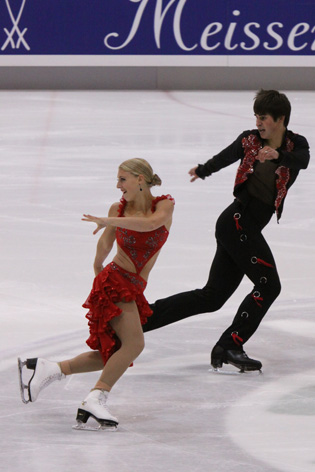 2009 Junior Grand Prix in Dresden (Pokal der Blauen Schwerter) - Piper Gilles and Zachary Donohue